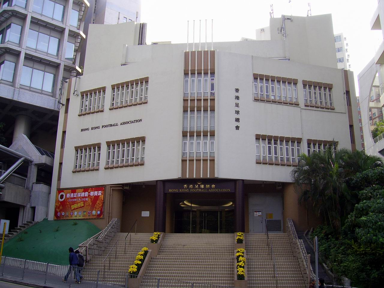 位於佛光街的香港足球總會總部